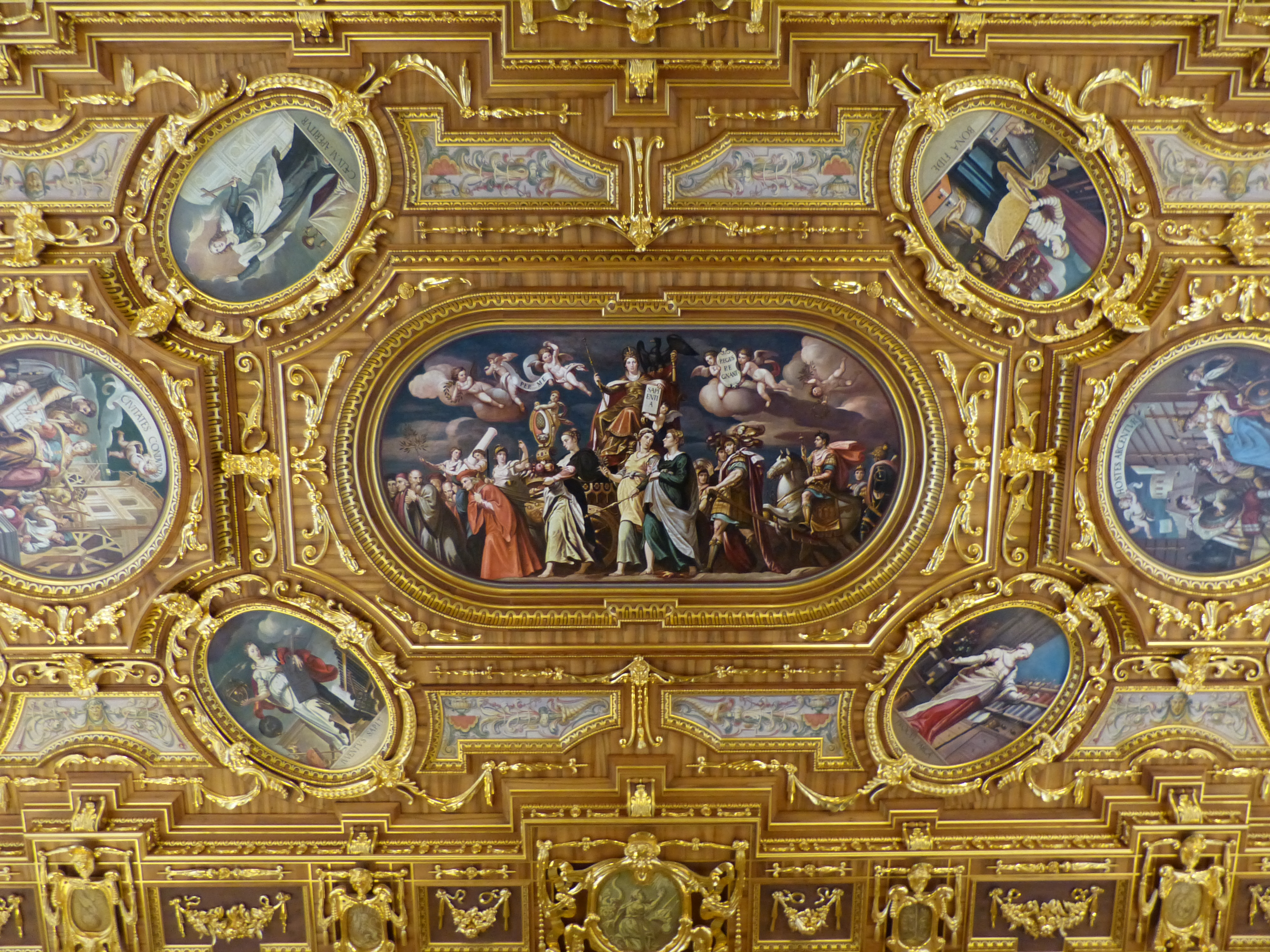 Goldener Saal, Rathaus in Augsburg, Bayern